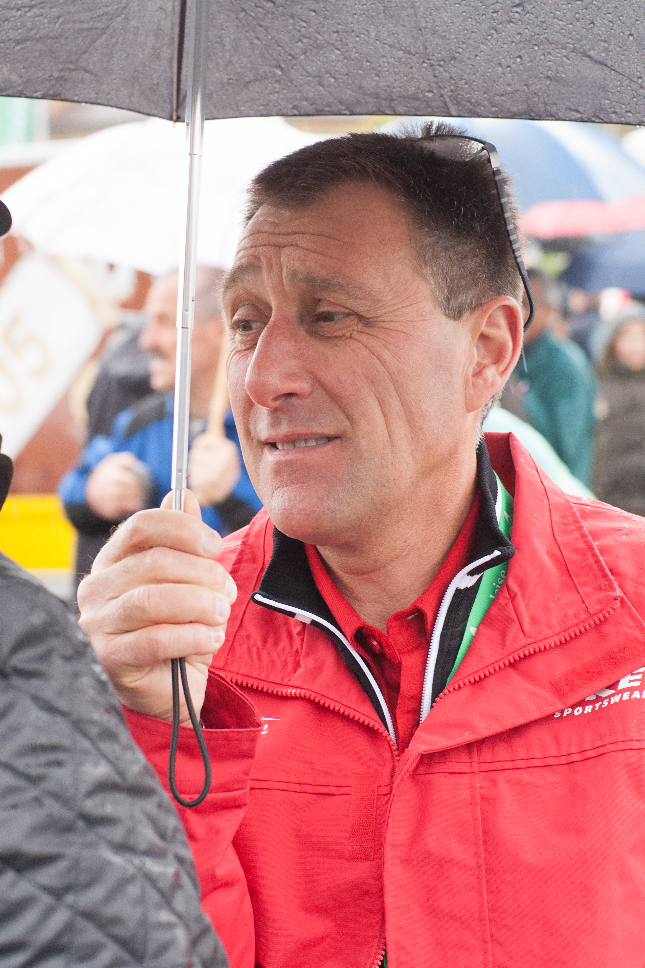 Charly Mottet au village départ de la 4ème étape du Tour de Romandie 2013.